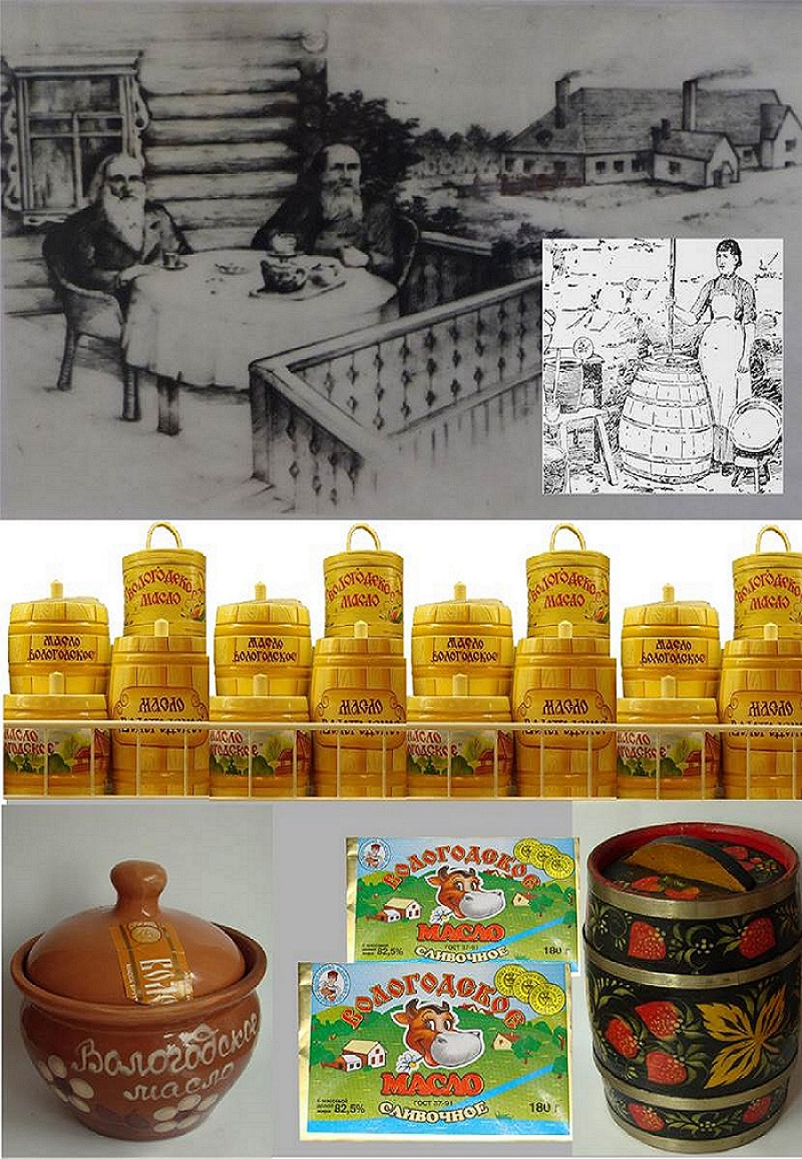 Wołogodzkie masło (montaż)